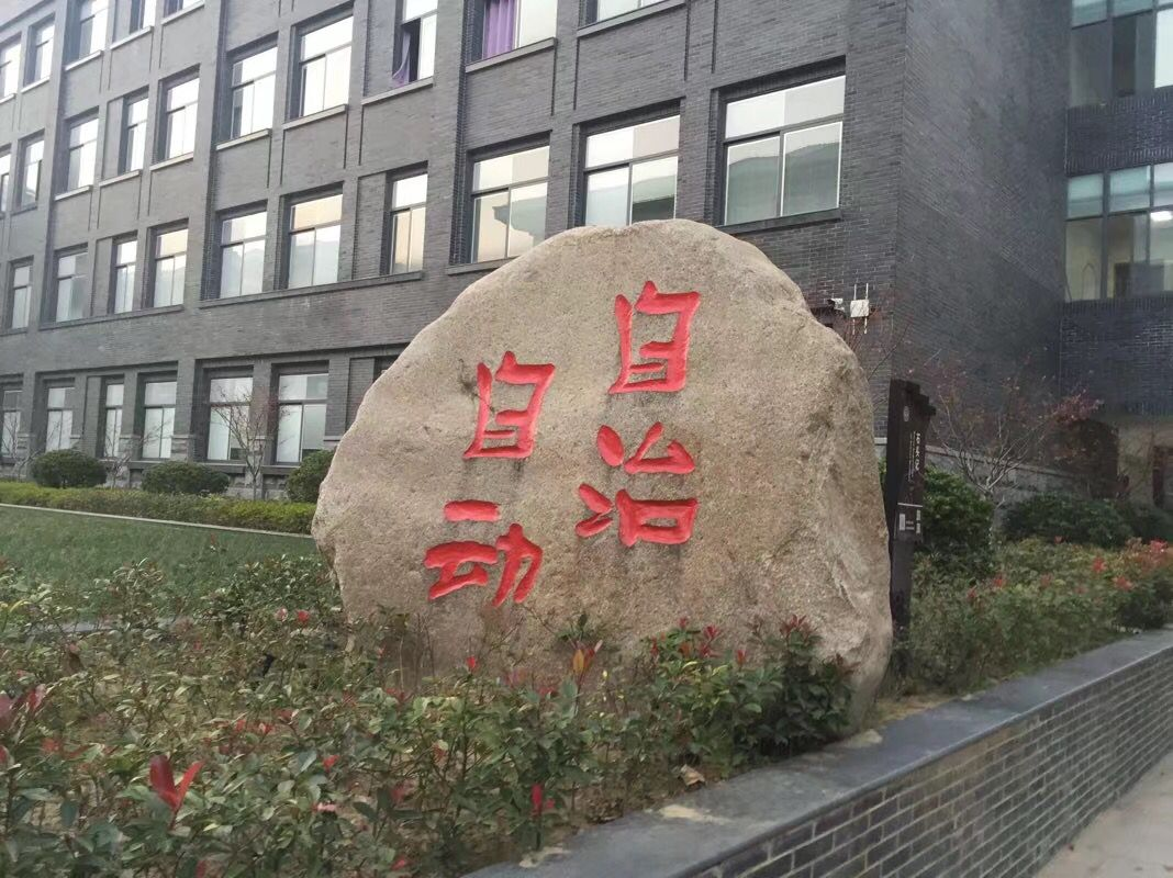 自治自动石